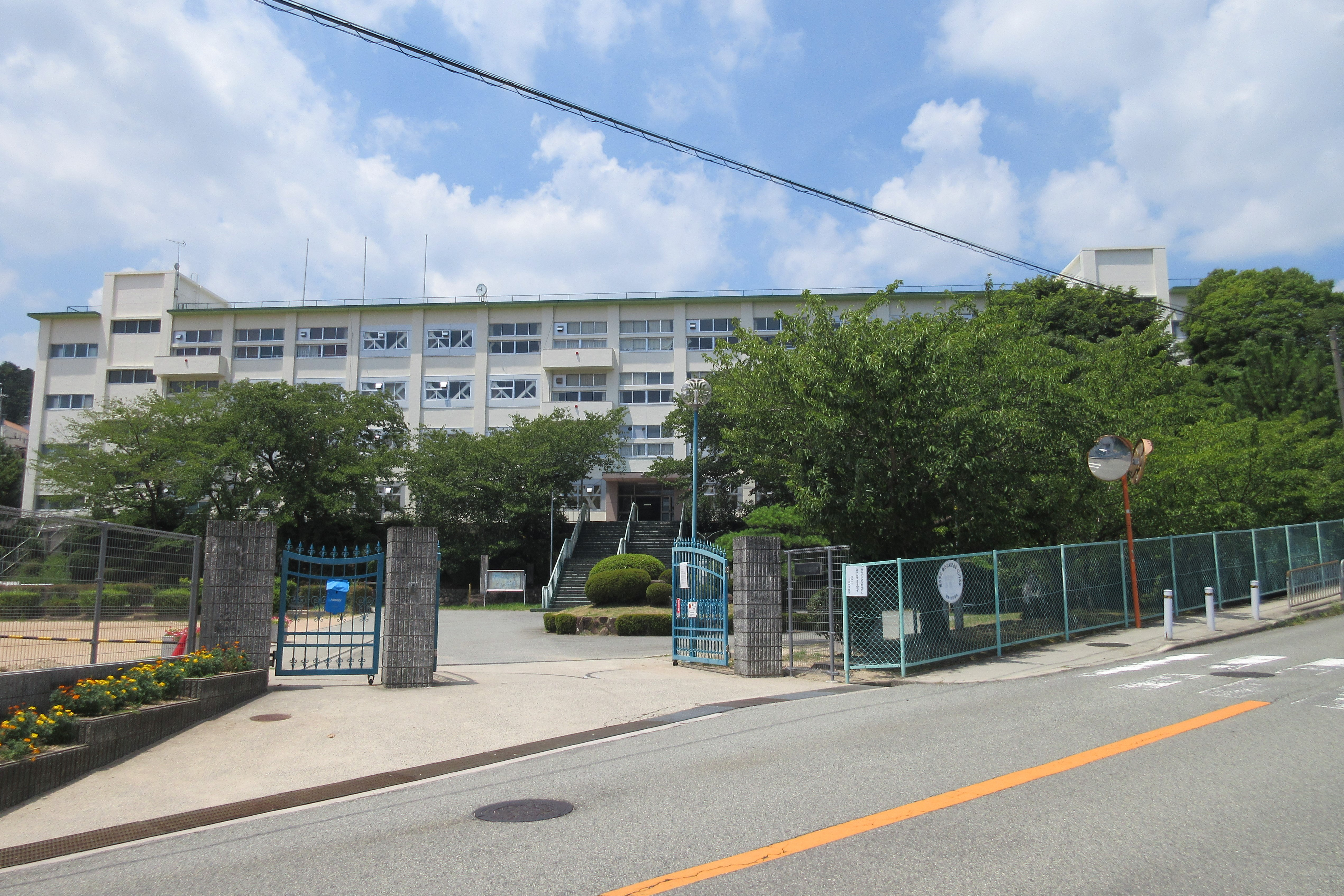 川西市立川西中学校